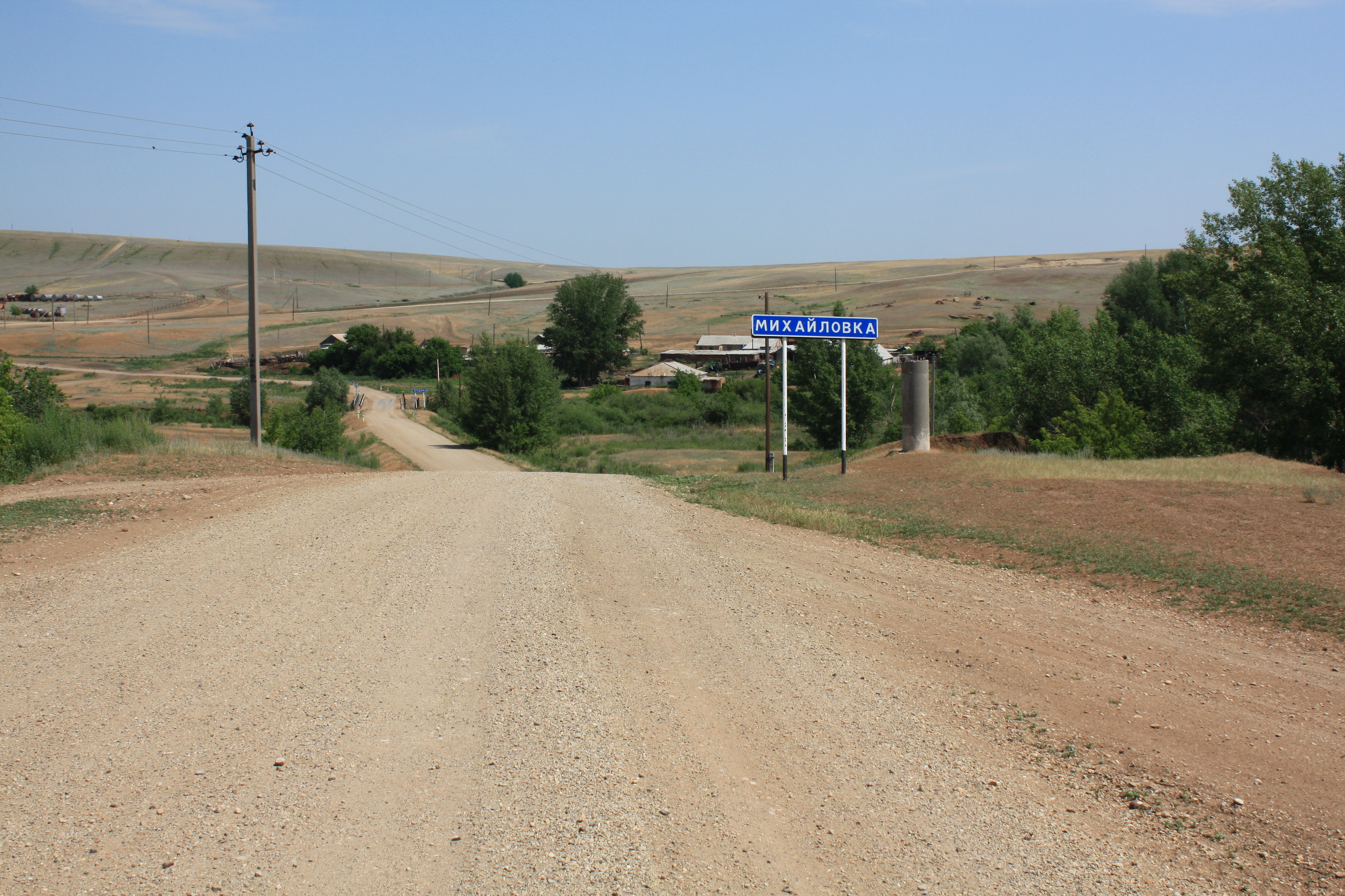 Въезд в Михайловку. Мост через Бердянку